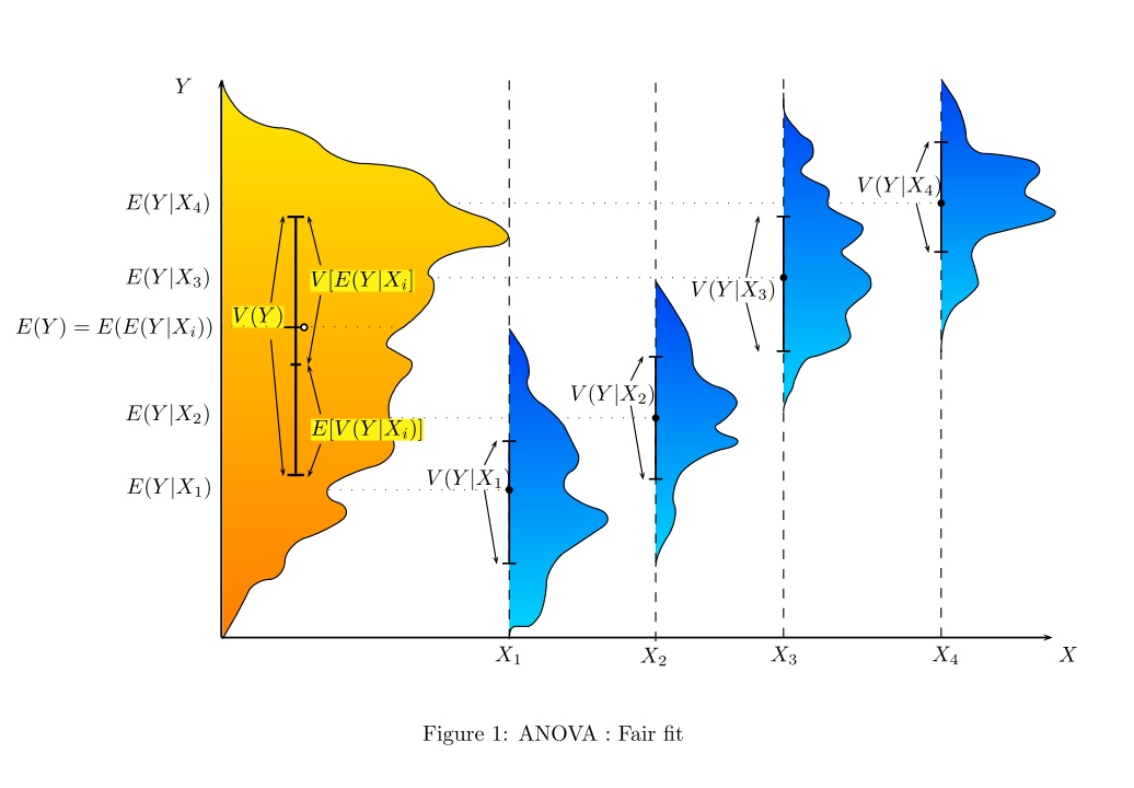 A representation of a situation with a fair fit in terms of ANOVA statistics